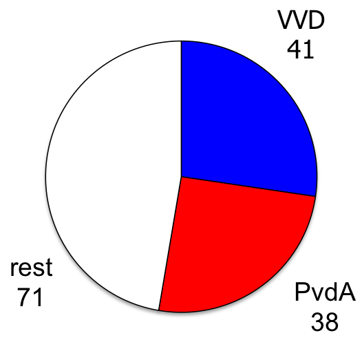 Cirkeldiagram kabinet-Rutte II